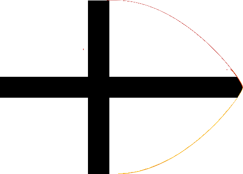 srednjovjekovna hr. zastava (iz Varnskog križarskog rata)